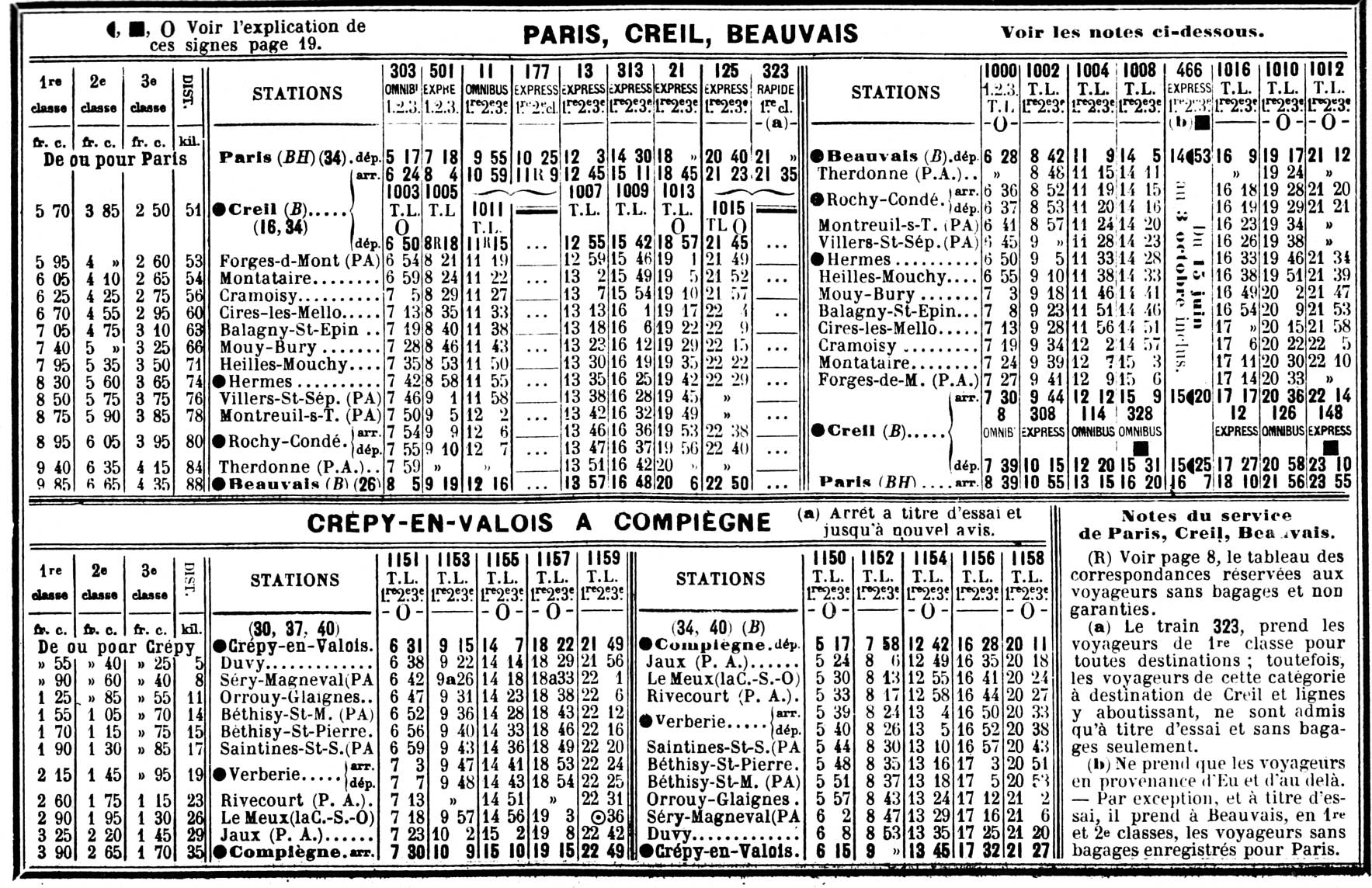 Tableau horaire de la ligne Gare du Nord - Creil - Beauvais et de la ligne Crépy-en-Valois - Compiègne.